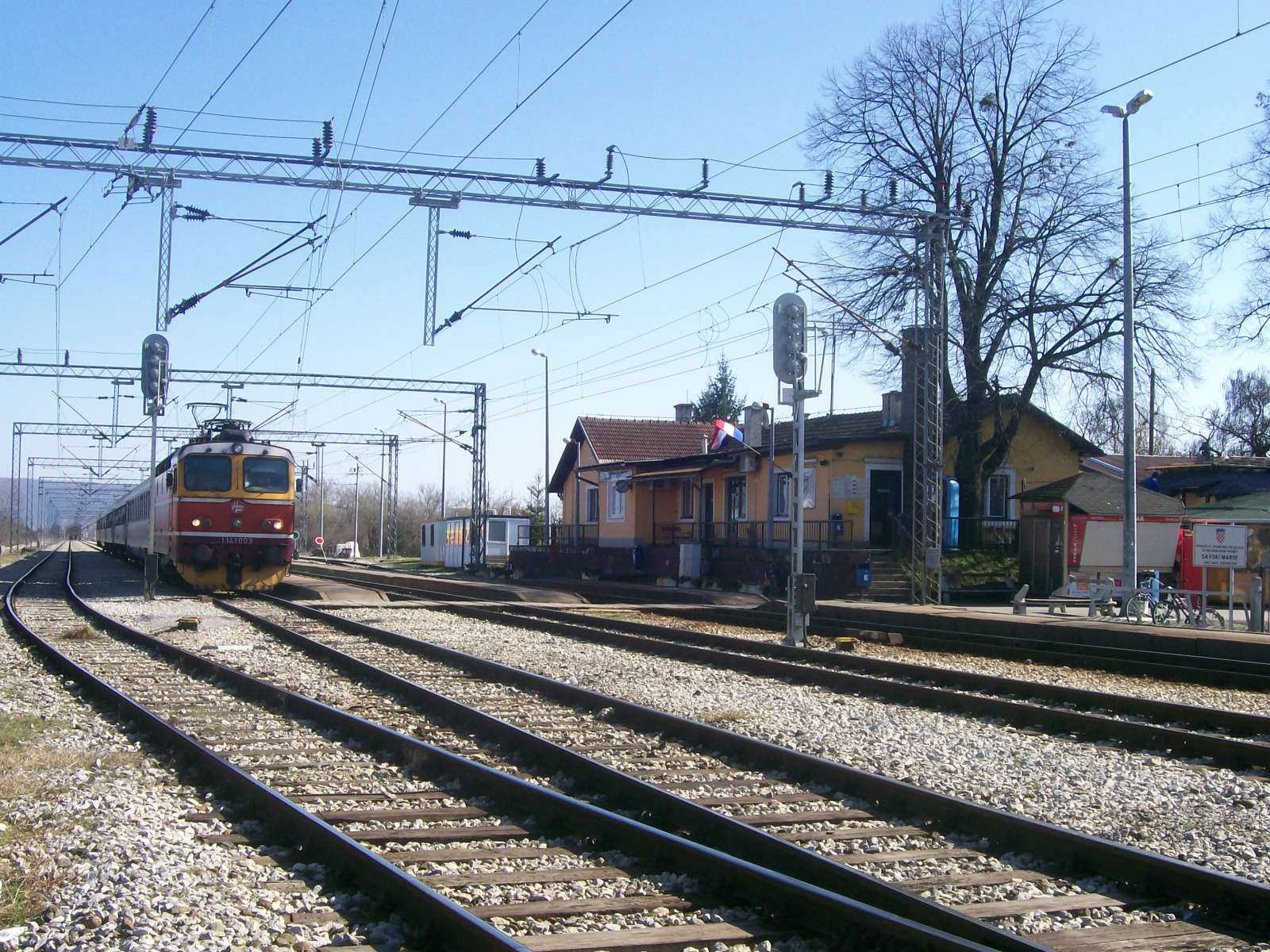 Željeznicka stanica Savski Marof